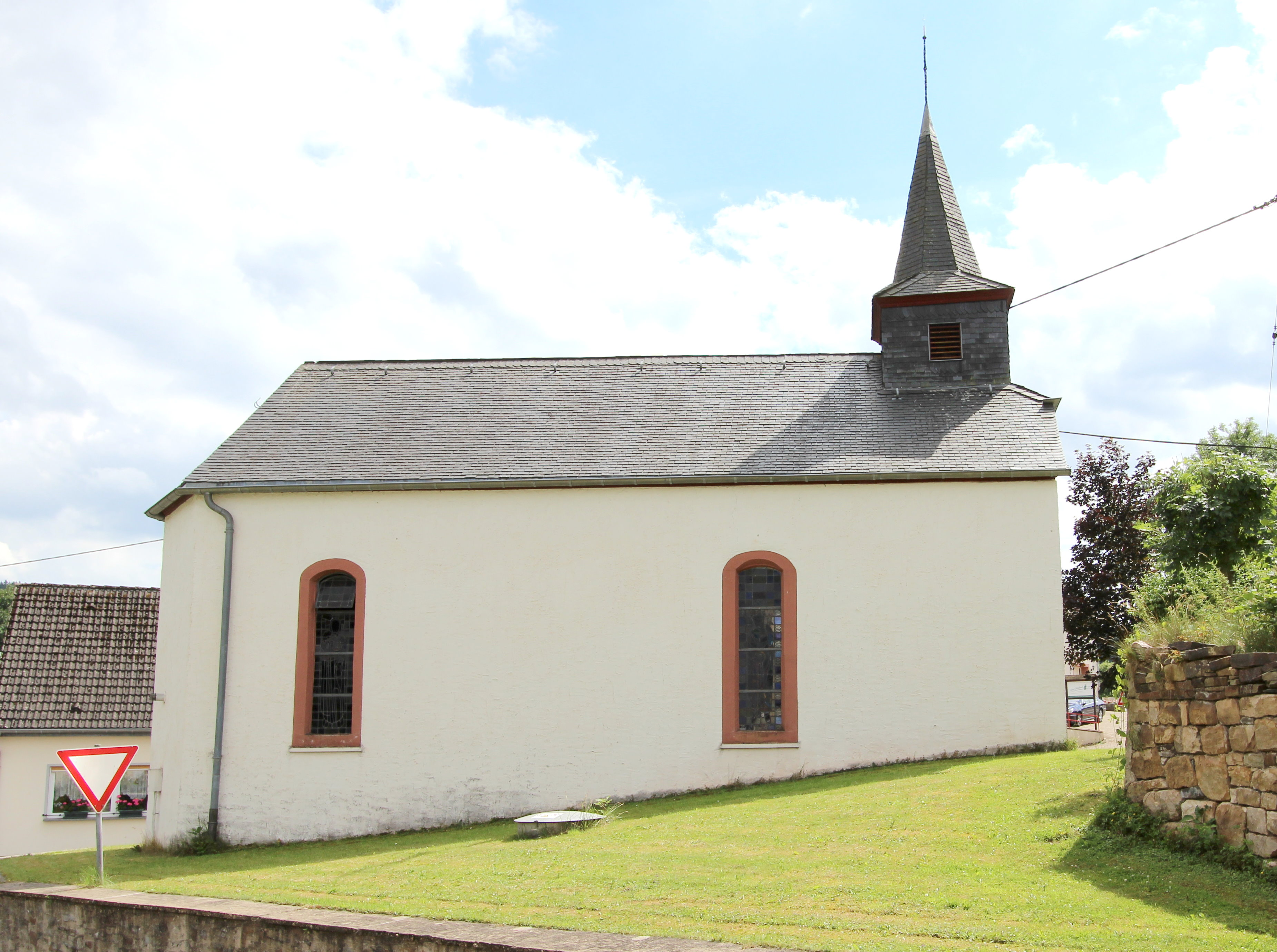 54597 Auw bei Prüm, Ortsteil Schlausenbach, Hauptstraße, Görresweg. Schmaler Saalbau mit Spitzhelmdachreiter, angeblich von 1658, bezeichnet 1691; mit Ausstattung. Aufnahme von 2017.